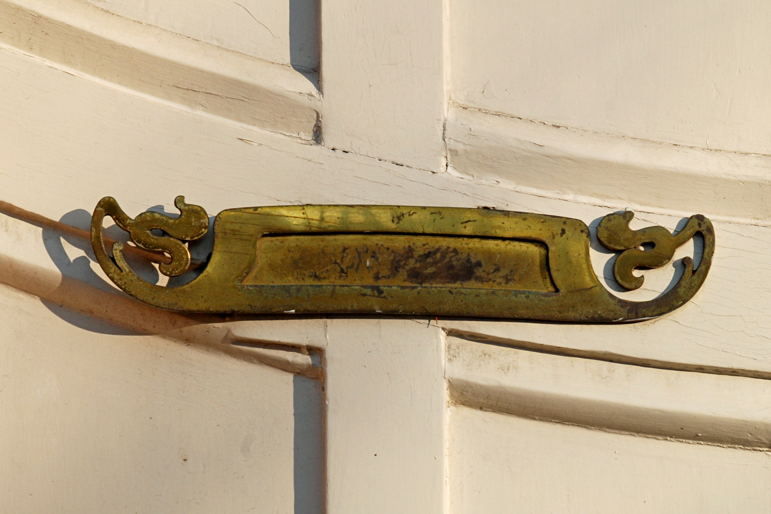 Belgique - Bruxelles - Villa Elisa (Art nouveau, architecte Victor Taelemans, 1899)